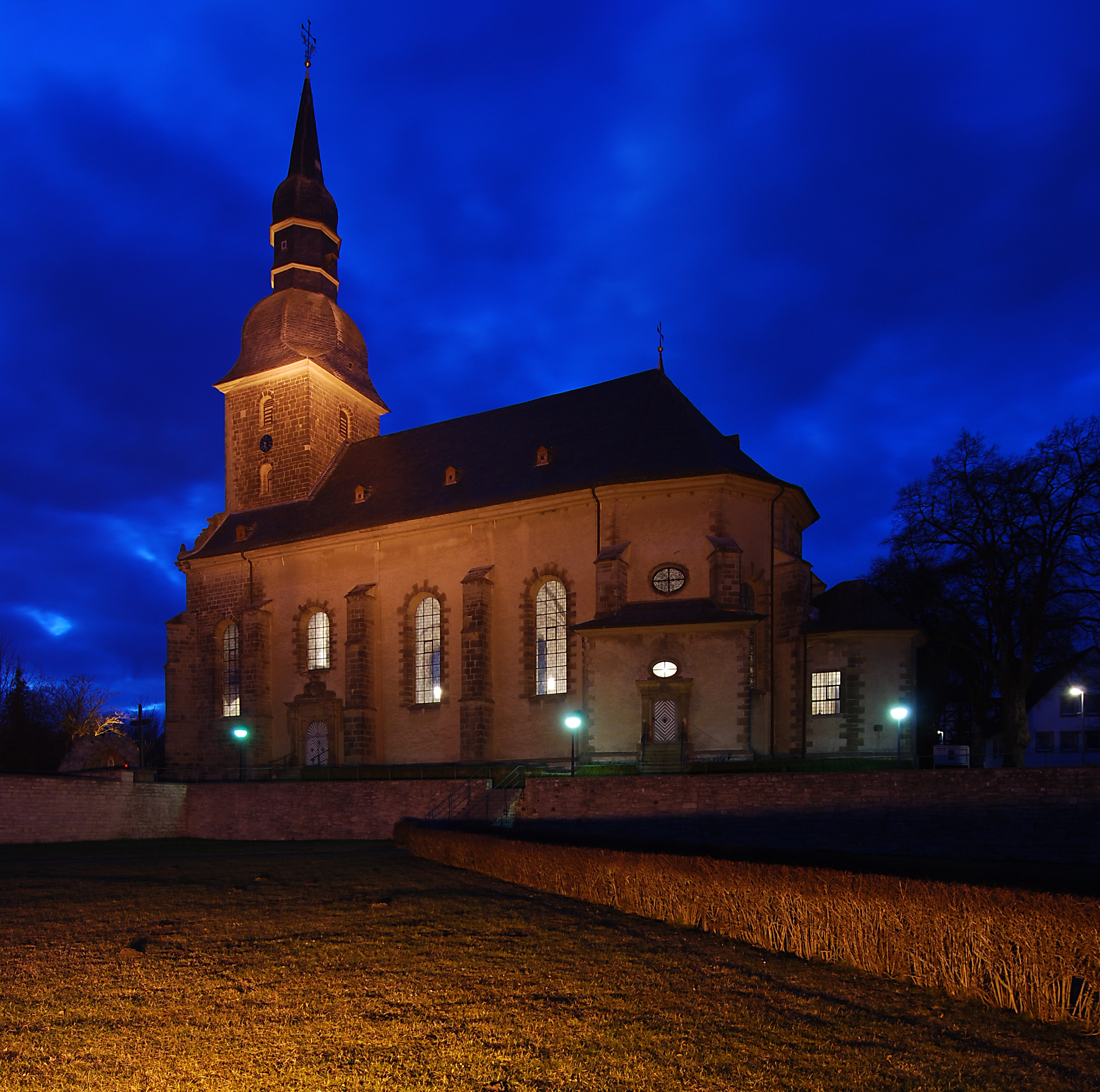 Kirche St. Margaretha an der Pater-Nikodemus-Straße im Ortsteil Sichtigvor der Stadt Warstein im Kreis Soest in Nordrhein-Westfalen This is a photograph of an architectural monument. Ⅳ 3